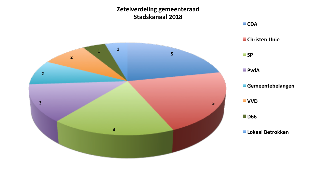 Stadskanaal zetelverdeling na gemeenteraadsverkiezingen 2018